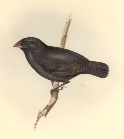 laut Bild: Geospiza fortis